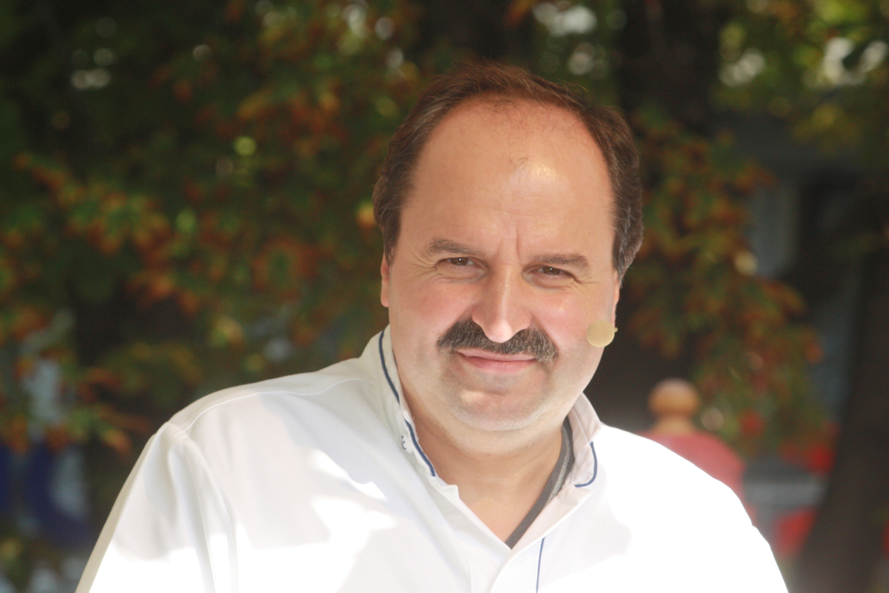 Johann Lafer, österreichischer Koch, Fernsehkoch, Unternehmer, und Sachbuchautor. Hier am 2. Oktober 2012 auf dem Münchner Viktualienmarkt.